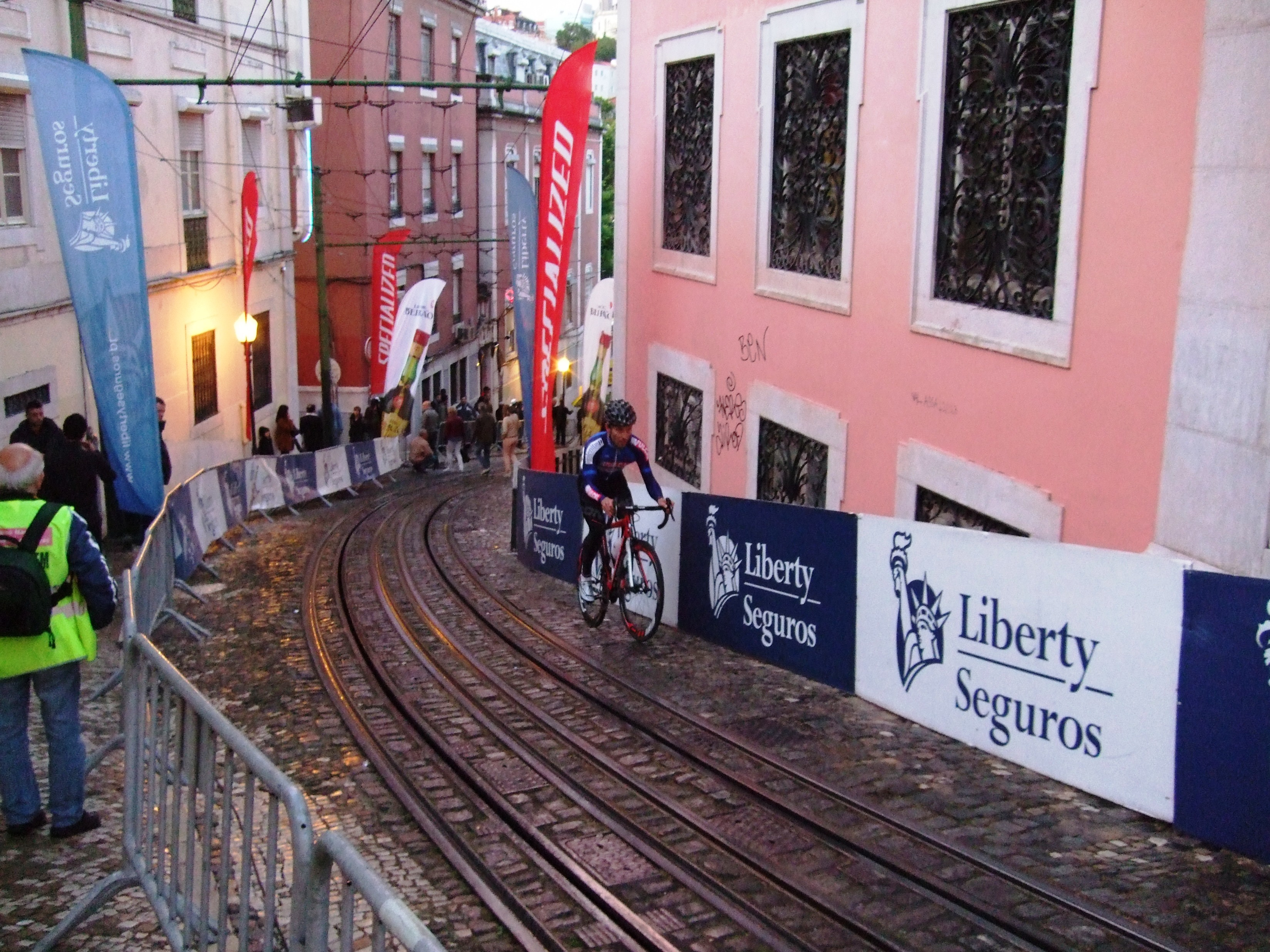 Radrennen Subida a Gloria, 17. Mai 2013